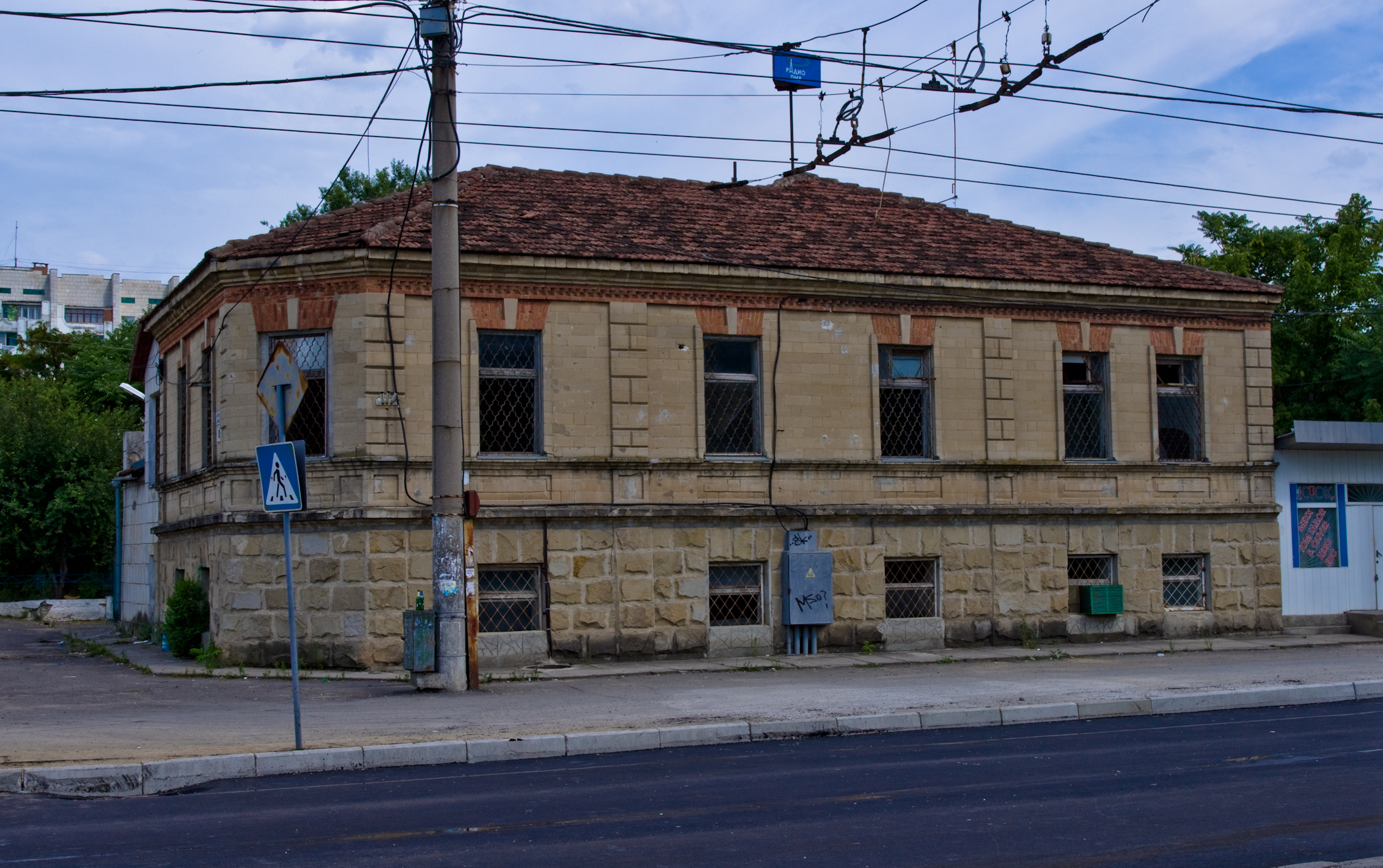 Старое здание "Радио Приднестровья" по ул. Шевченко. В 2015 году, в связи с реконструкцией, это здание было снесено.